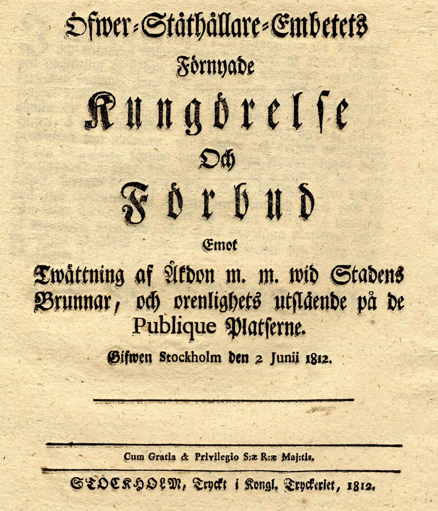 Öfwer-Ståthållare-Embetets Förnyade Kungörelse Och Förbud Emot Twättning af Åkdon m.m. wid Stadens Brunnar, och orenlighets utslående på de Publique Platserne. Gifwen Stockholm den 2 Junii 1812.